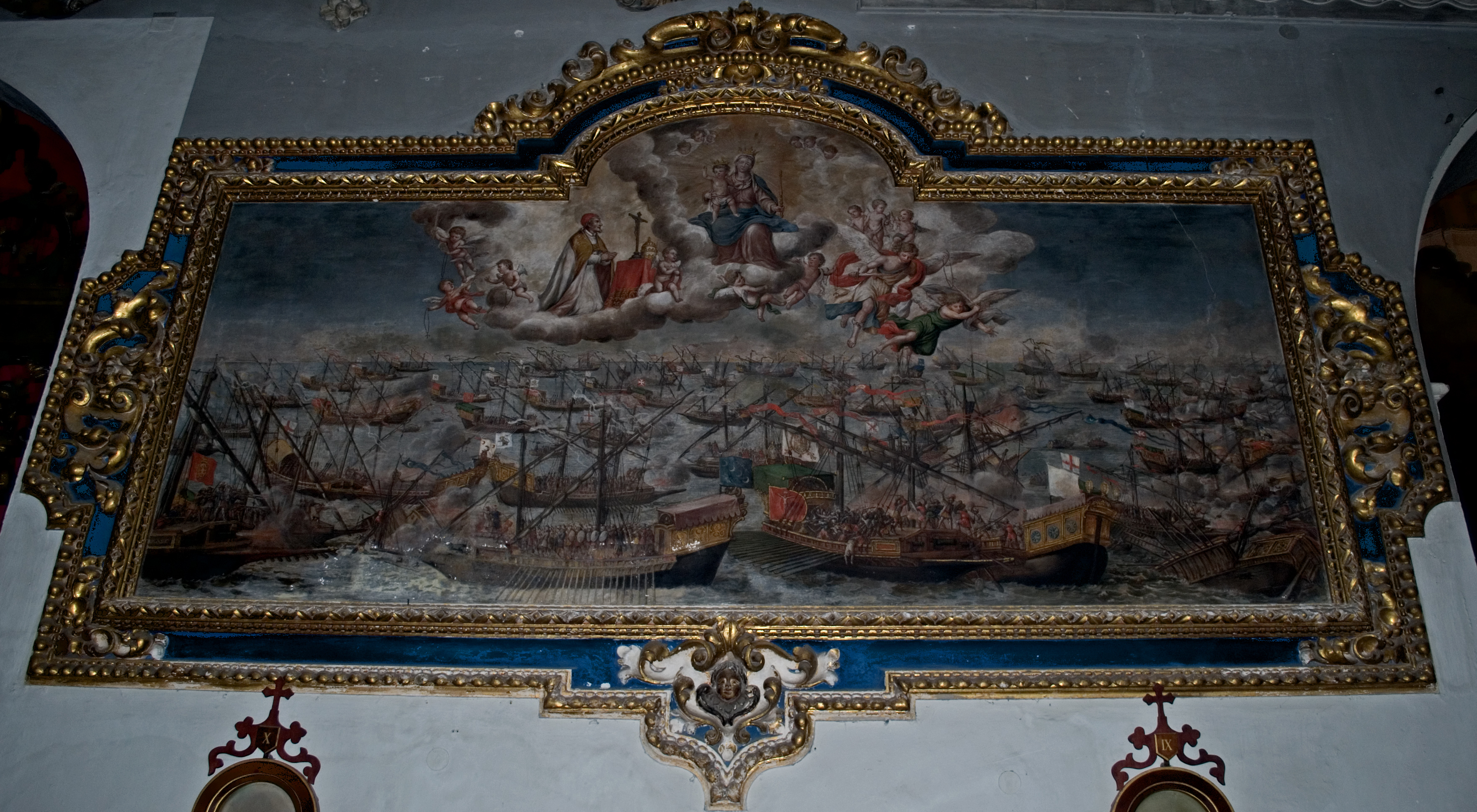 "La Virgen del Rosario protegiendo las naves españolas en la Batalla de Lepanto", fresco, enmarcado por yeserías, obra original de Lucas Valdés en la Iglesia de la Magdalena de Sevilla.